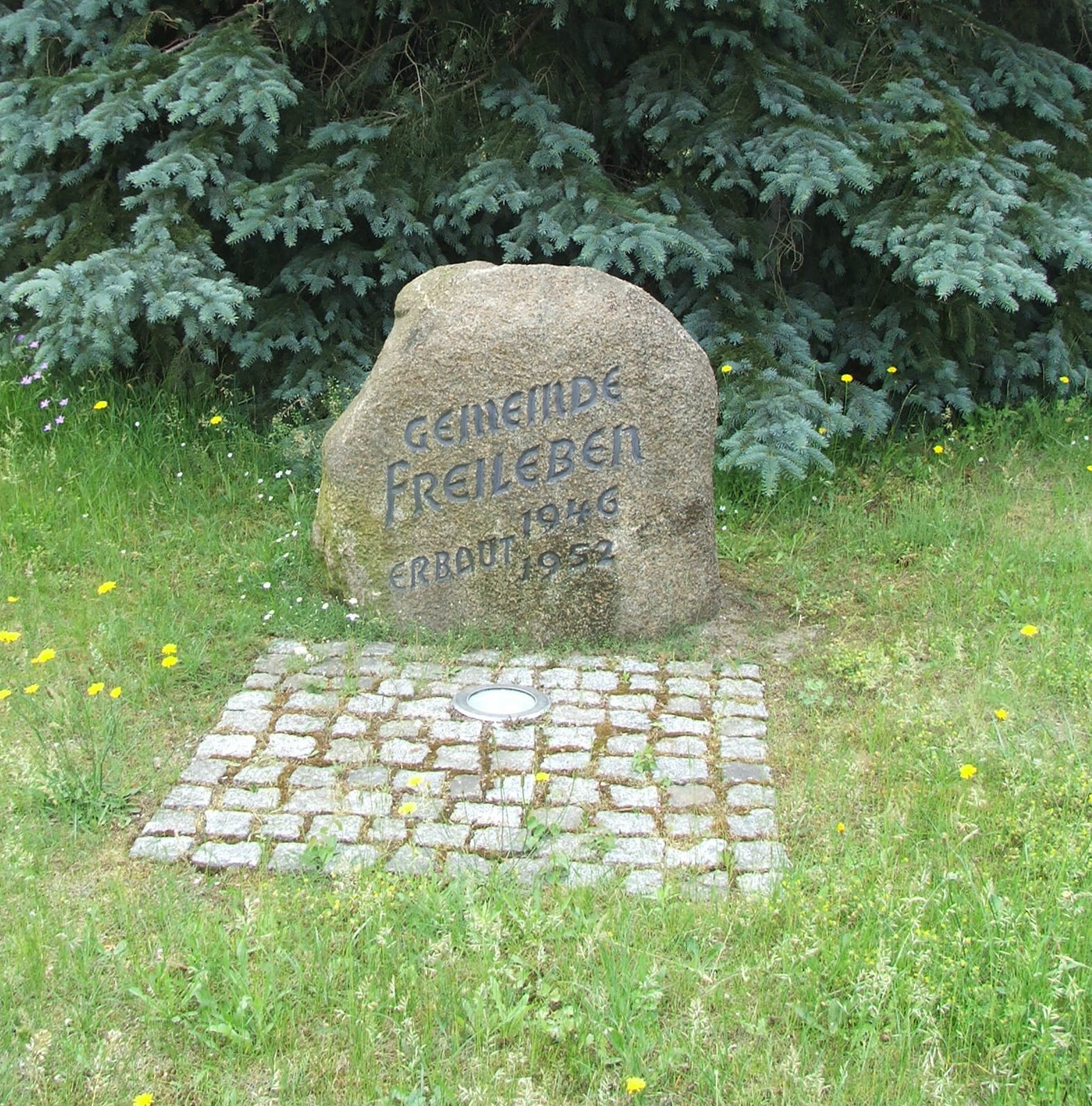 Freileben, memorystone